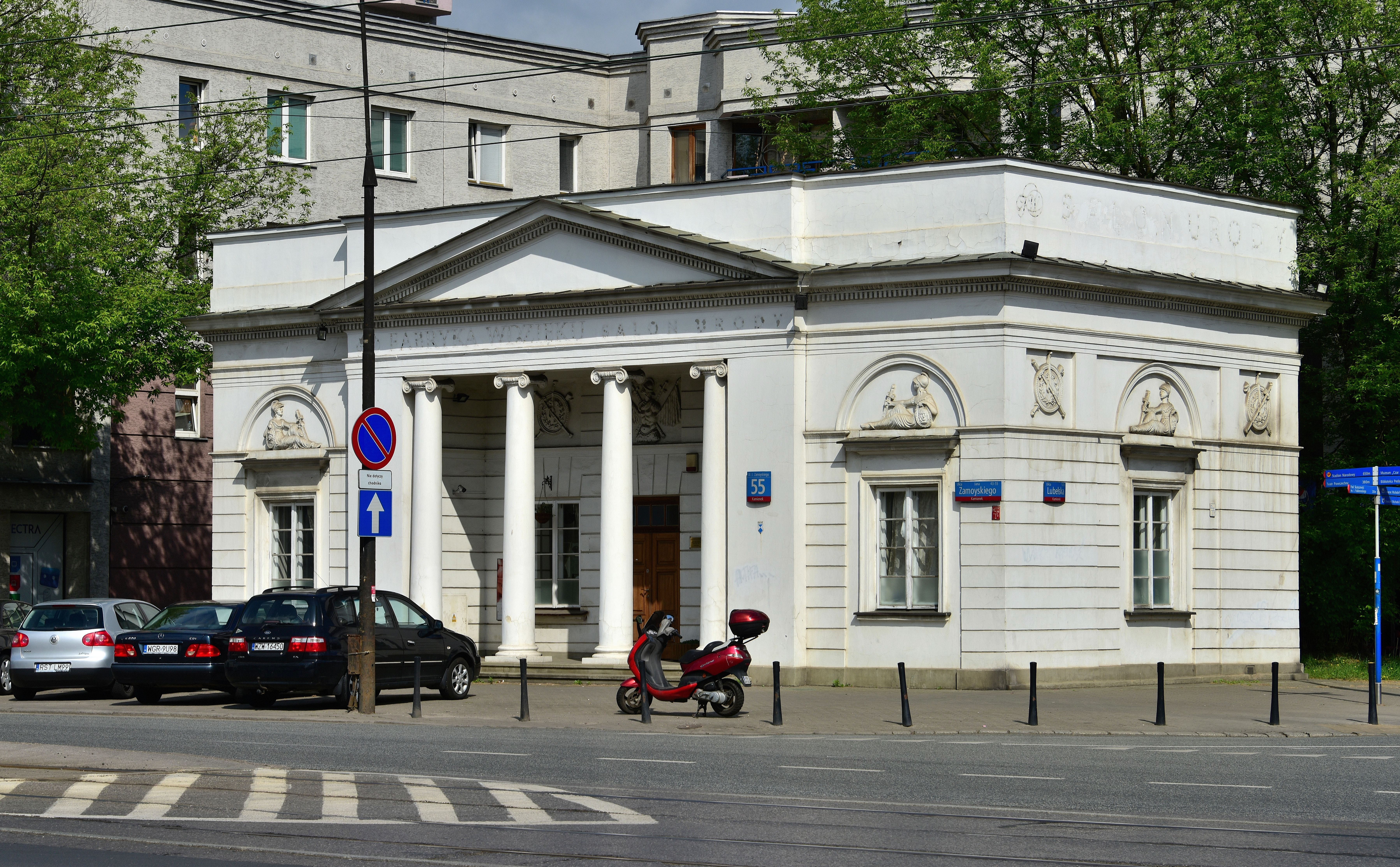 Północna Rogatka Grochowska